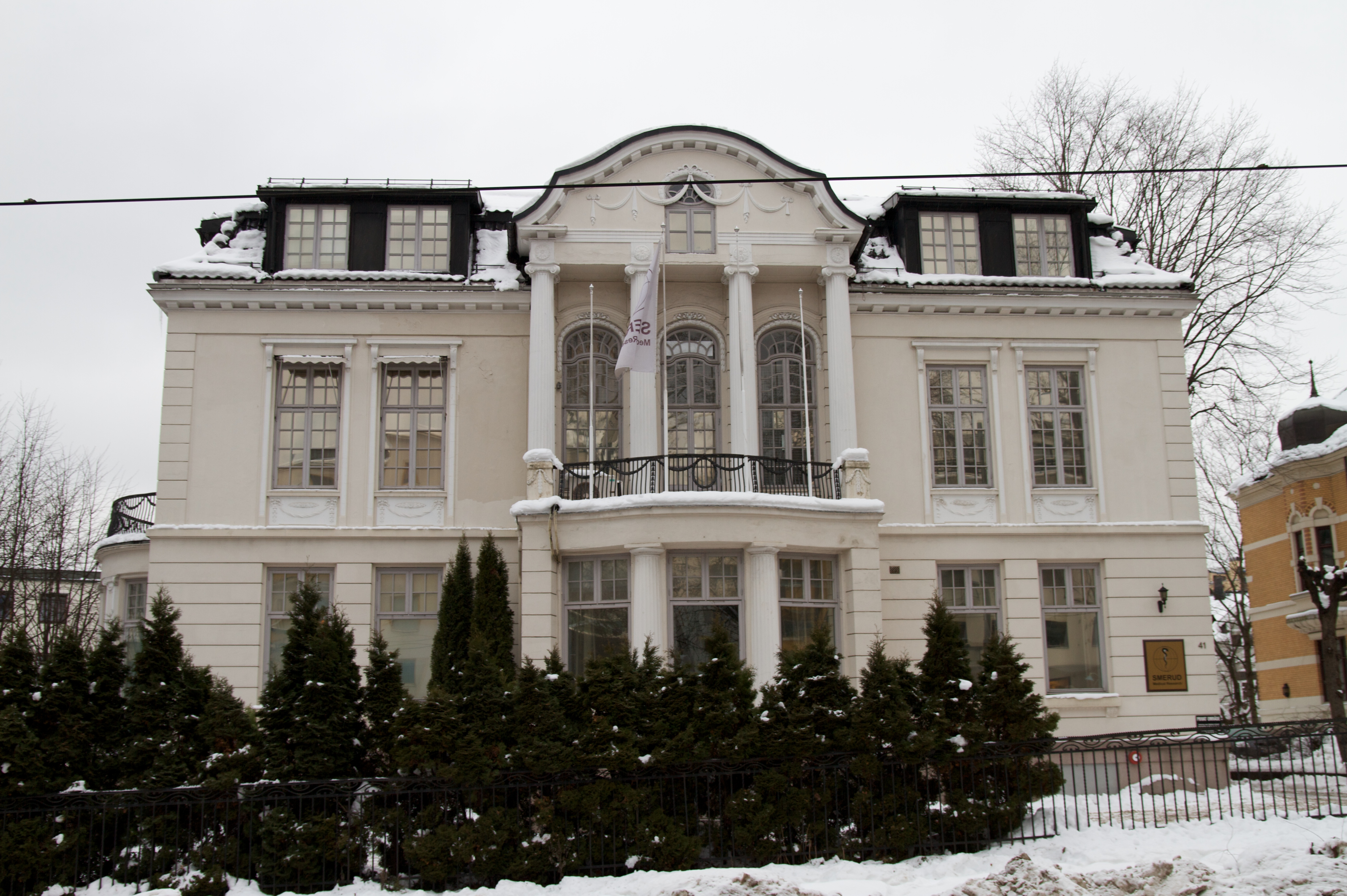 Drammensveien 41 i Oslo.